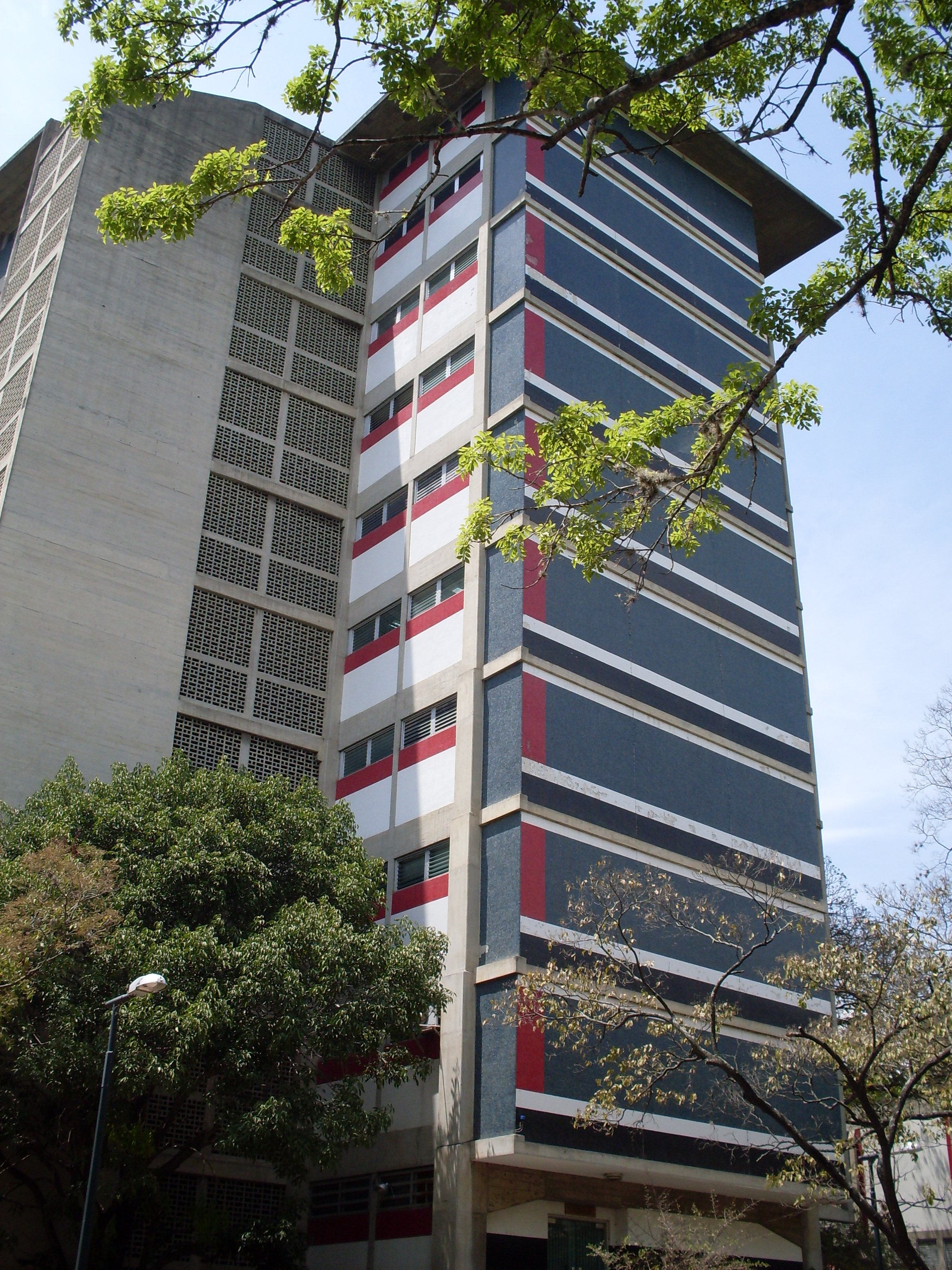 Mural de Omar Carreño. Título: Sin Título. Autor: Omar Carreño. Año: 1957. Ubicación: Universidad Central de Venezuela. Fachadas del Edificio de la Facultad de Odontología.